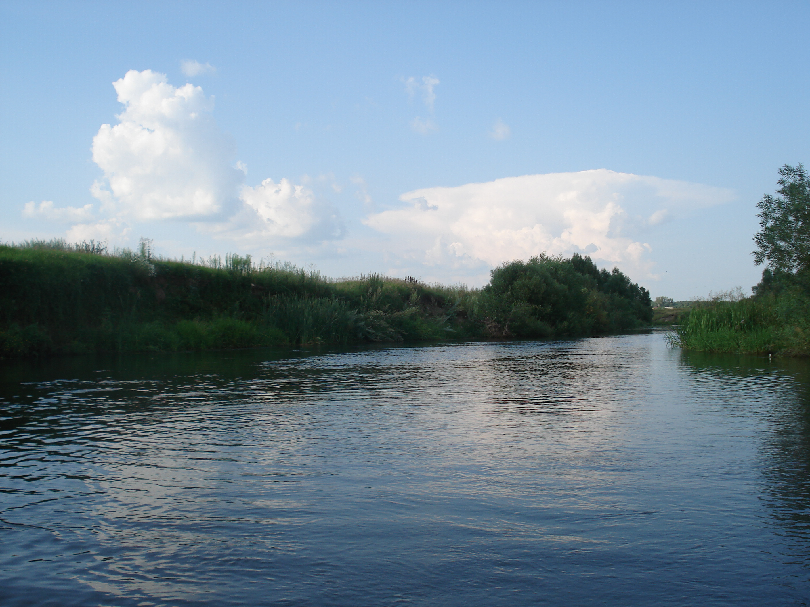 река Пара вблизи с.Красное